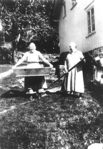 To kvinner med bakstetrau. Fotografert på gården Syrdalen i Austre-Muland, Aust-Agder i 1927.